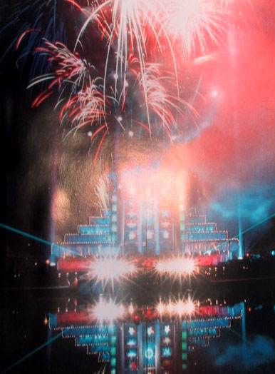 Concert en 1993 avec Jean-Michel Jarre au Heysel à Bruxelles devant 70.000 spectateurs.